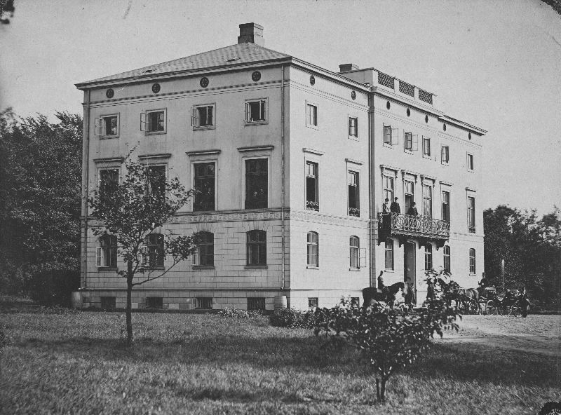 Konsul Perssons villa i Helsingborg före ombyggnaden 1884–1885.